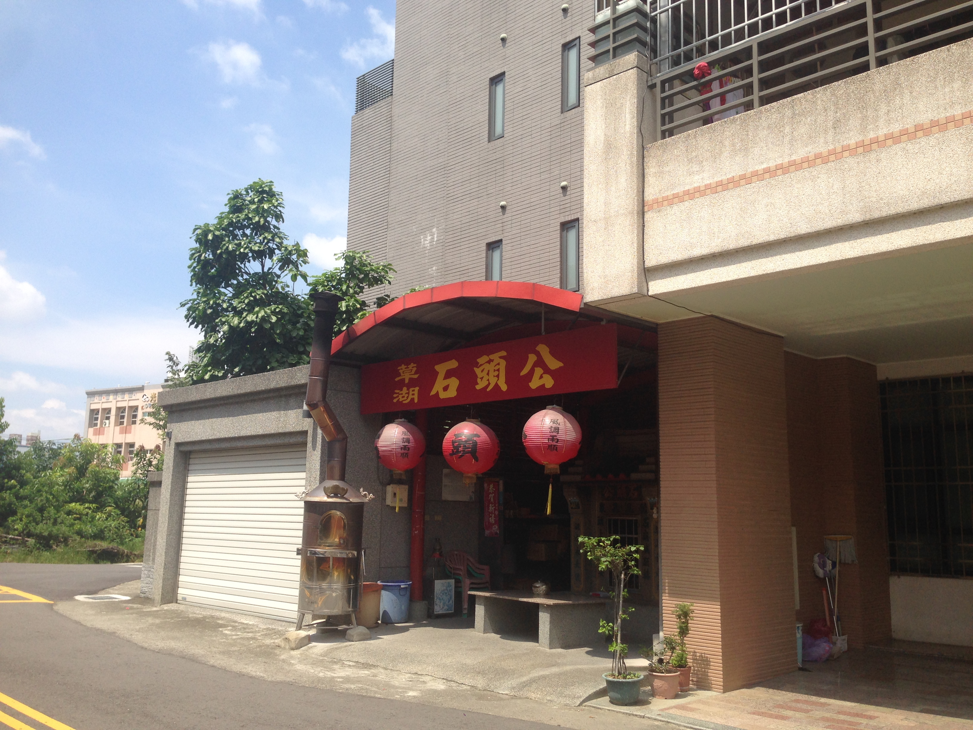 草湖石頭公廟外